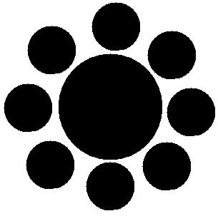 Image créee sous paint qui représente le mon (blason japonais) du clan Hosokawa.